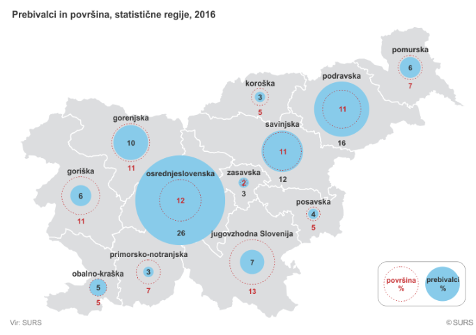 Prebivalstvo in površina, statistične regije, 2016